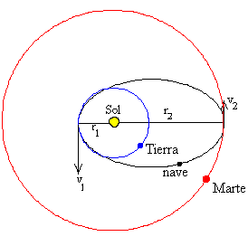 Encontro de planetas